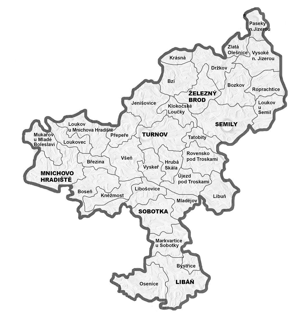 Diecéze litoměřická, turnovský vikariát - farnosti